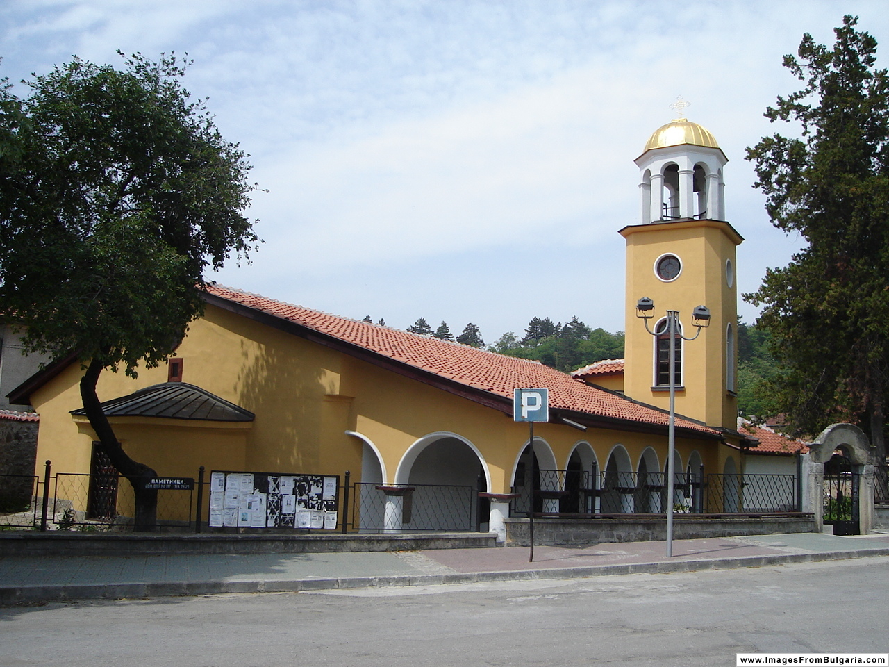 Mirkovo, Sofia Province, Bulgaria This file, which was originally posted to , is licensed under Creative Commons Attribution 2.5 License. Attribution: Rainov In short: you are free to distribute and modify the file as long as you attribute its author(s) or licensor(s). Check for other images from this website. Този файл, оригинално качен на сайта , е лицензиран под условията на лиценза Creative Commons Признание 2.5. Признание: Rainov Накратко: имате свободата да разпространявате и променяте файла, стига да посочвате неговия (неговите) автор(и) или лицензодател(и). Разгледайте други картинки от този уебсайт.